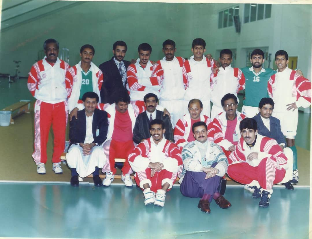 الكابتن أسعد مع مجموعة من لاعبين وفيني واداريي المنتخب اليمني بصالة استاد الملك فهد بالرياض عام 1996 م